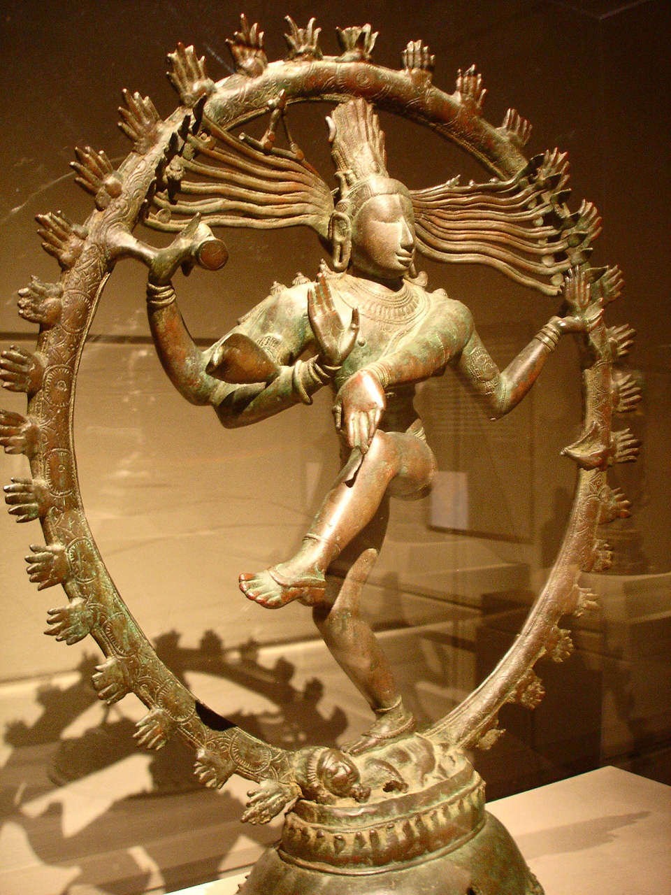 Nataraja in Metropolitan Museum NYC